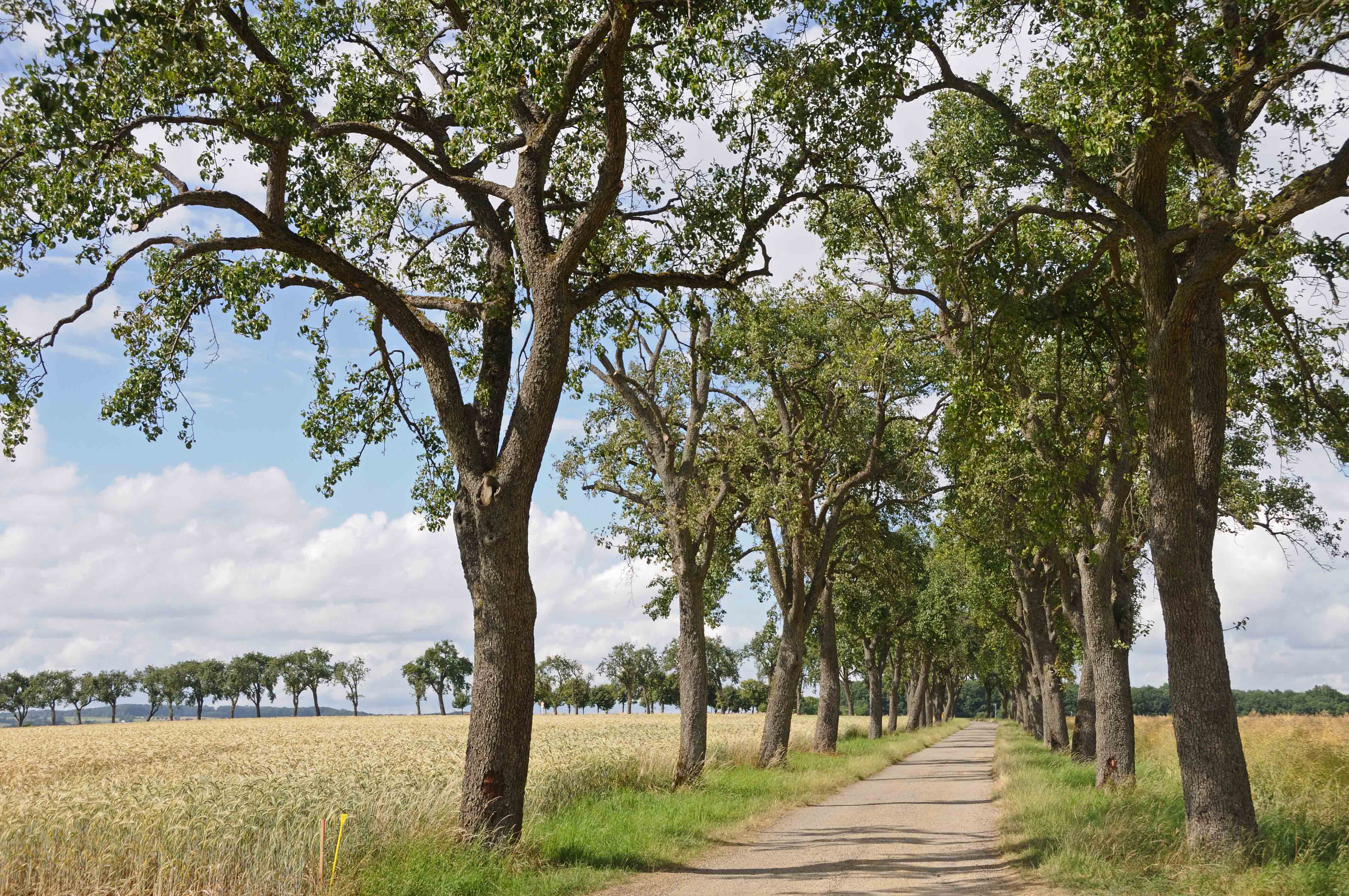 Birebamallee zu Munneref. Munneref Biren + Kategorie:Gemeng Munneref